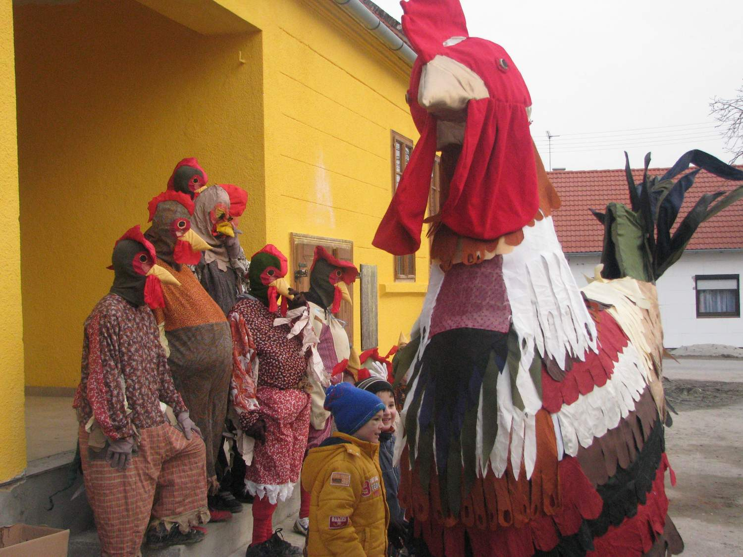 mađarski narodni običaj Kakasütés, Vardarac